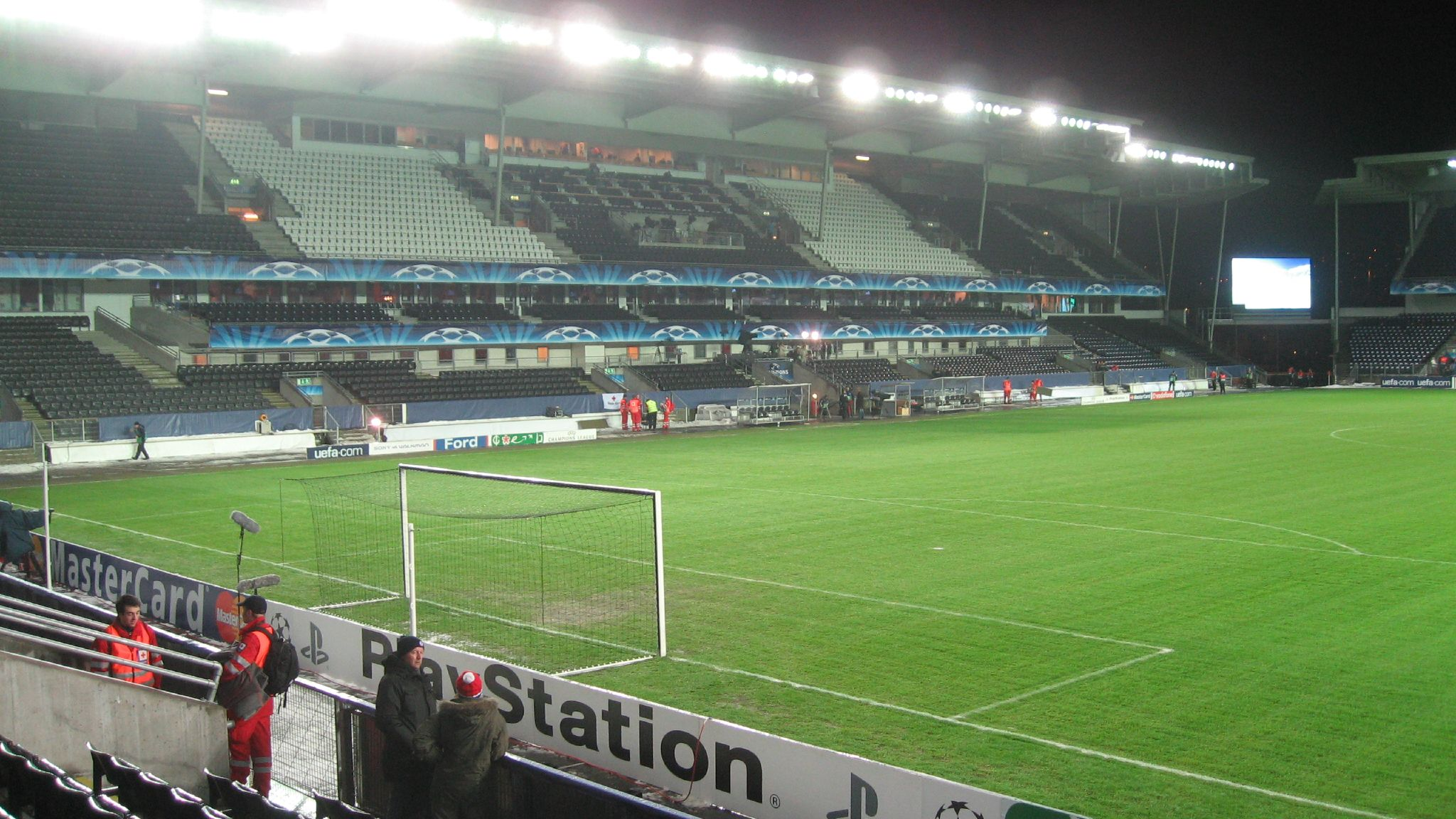 rosenborg (0) v CHELSEA (4) - 28/11/07